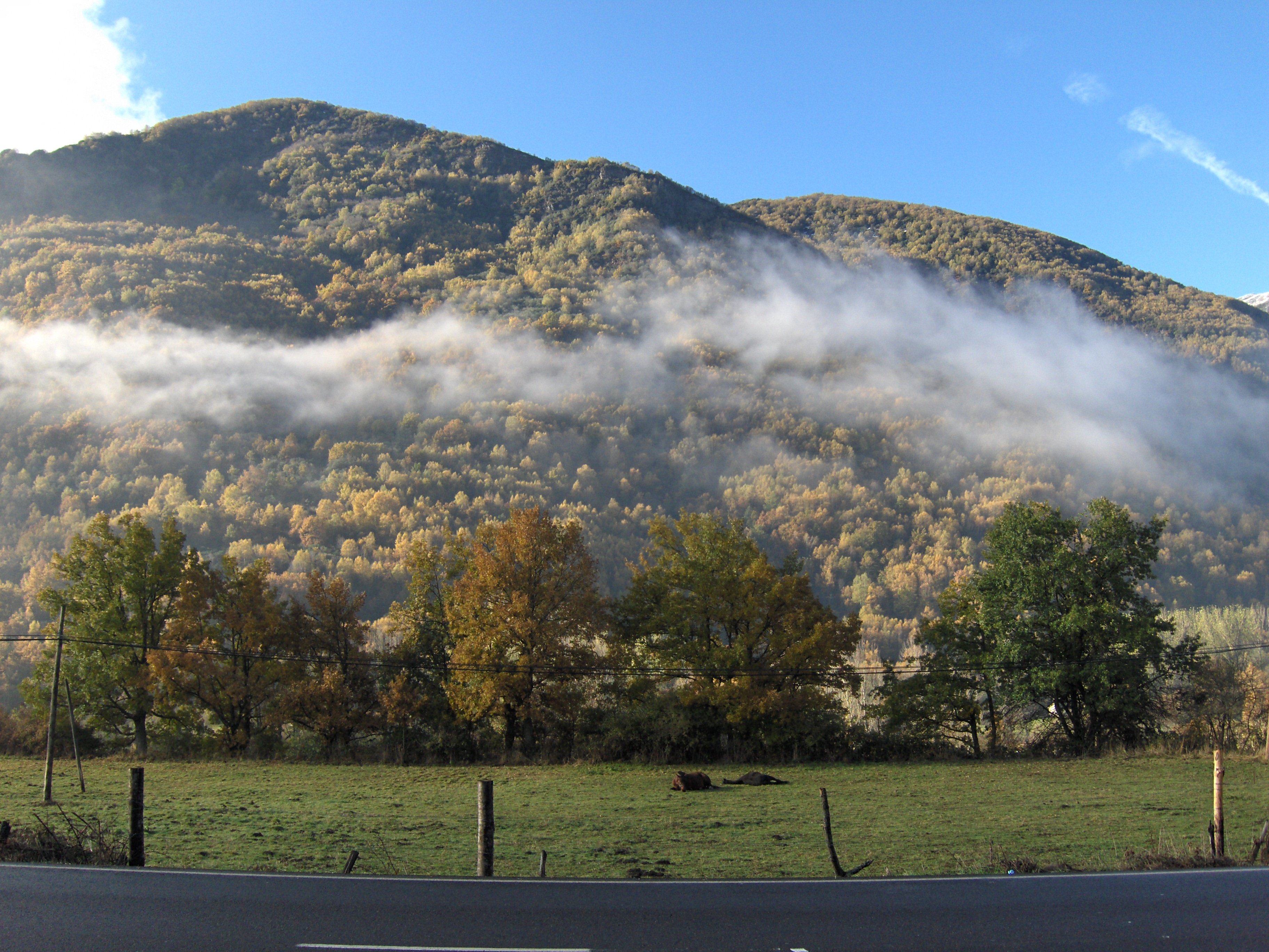 Valle de Laciana (León) en otoño